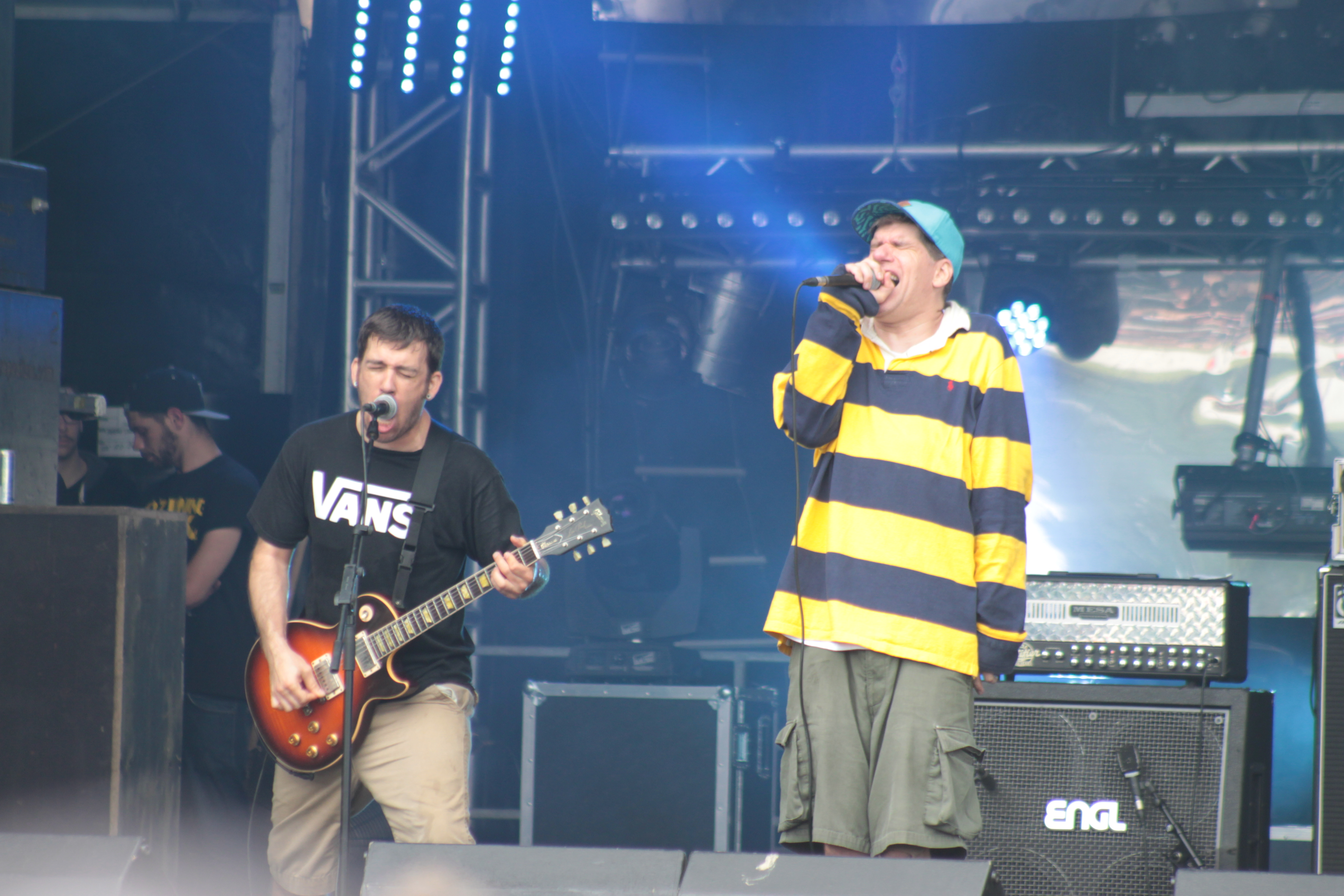 Aaron Dalbec et Aaron Bedard, Bane, Helfest 2013, Fr-44-Clisson.